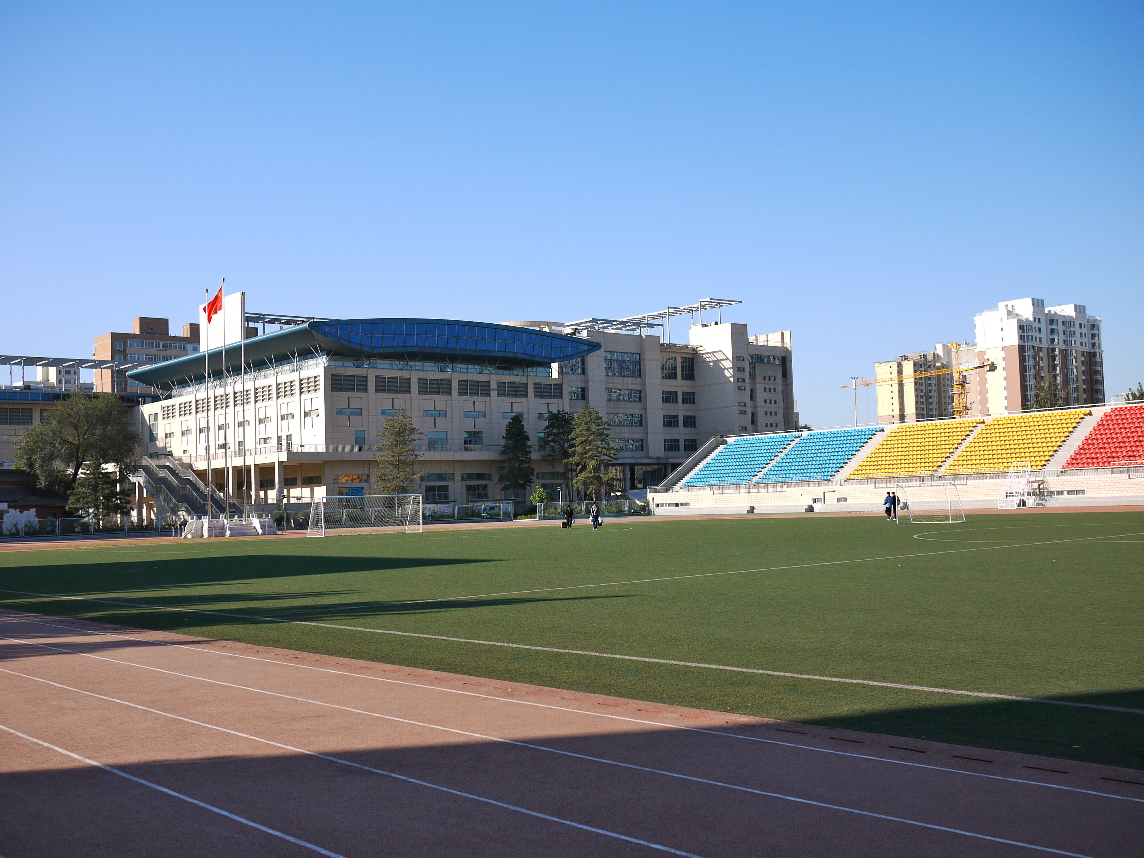 北京市十一学校 操场